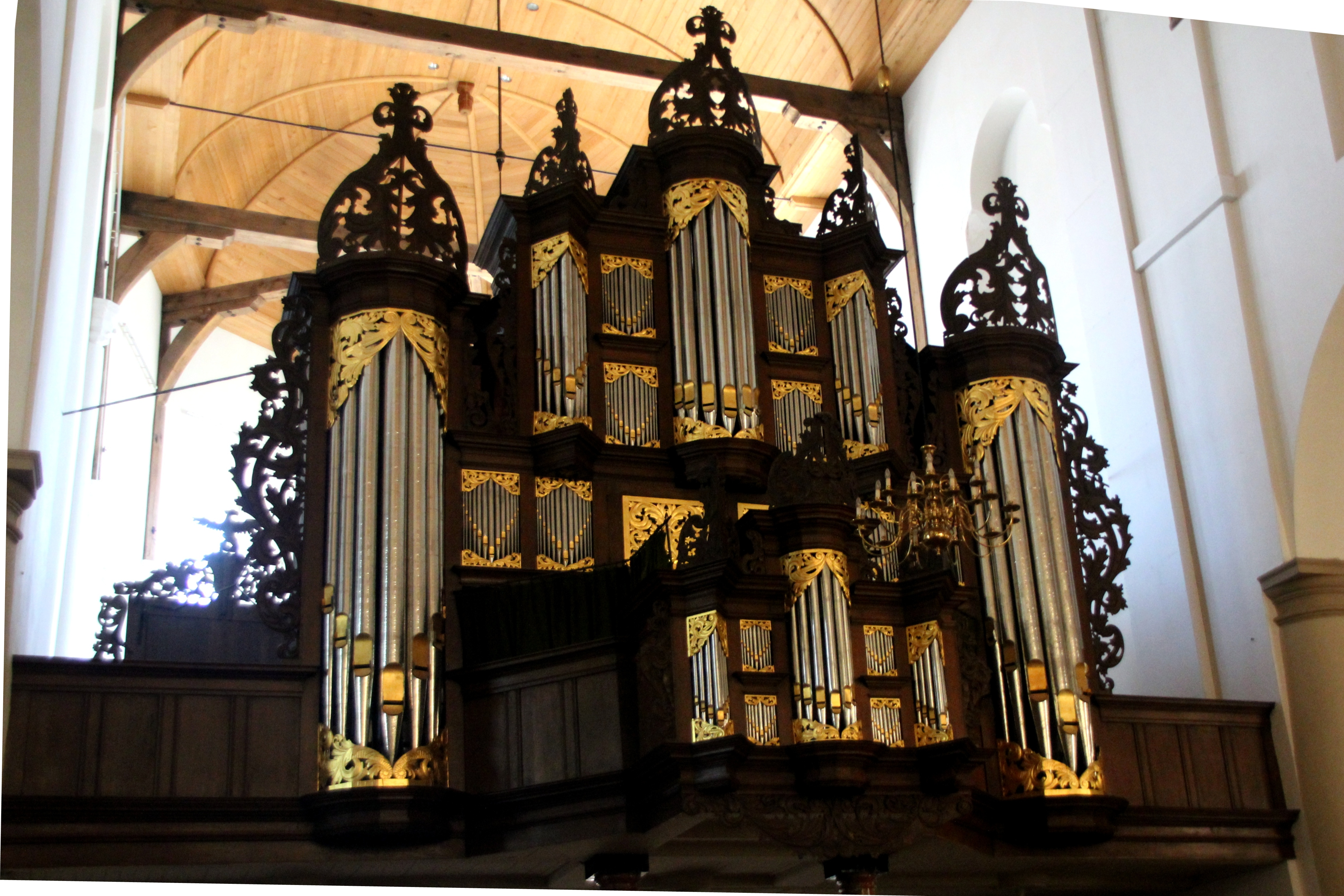 Schnitger-Orgel der Martinikerk in Sneek, Friesland, Niederlande